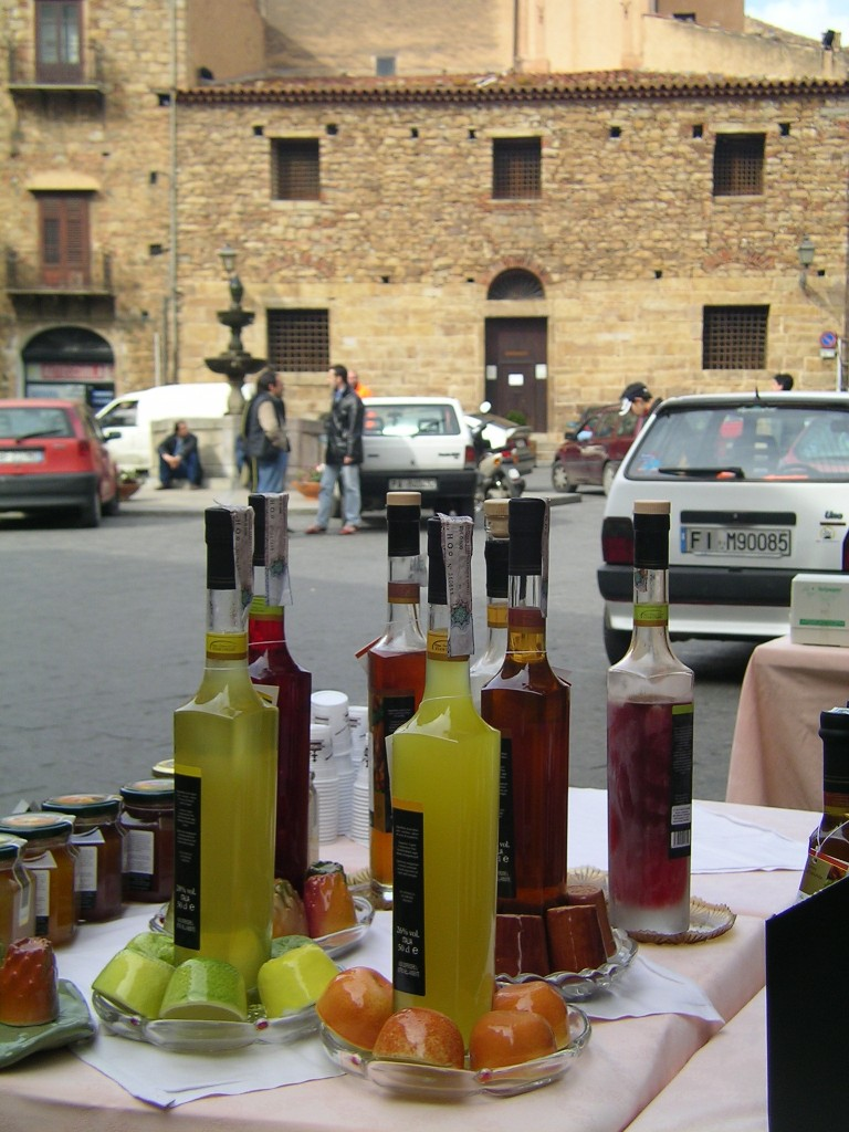 Piazza di Castelbuono